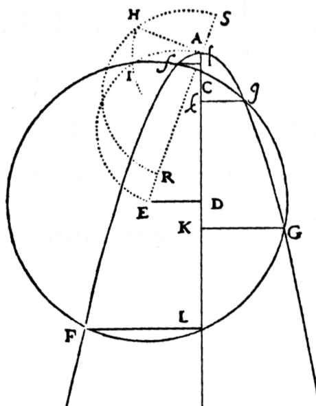 Solucions de cúbiques i quàrtiques a la Geometria de Descartes